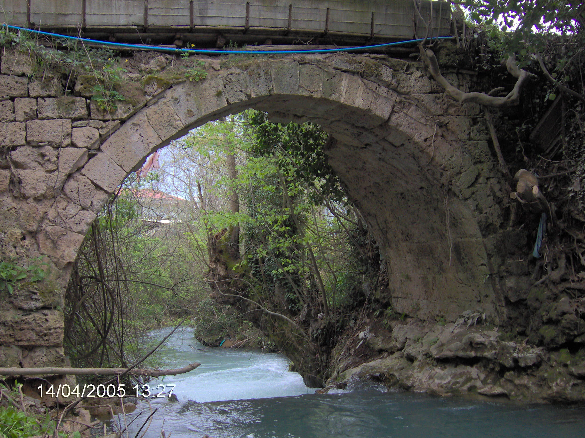 Το Παλιογέφυρο, παλιό πέτρινο γεφύρι στον ποταμό Αράπιτσα, μόλις έξω από την Νάουσα.